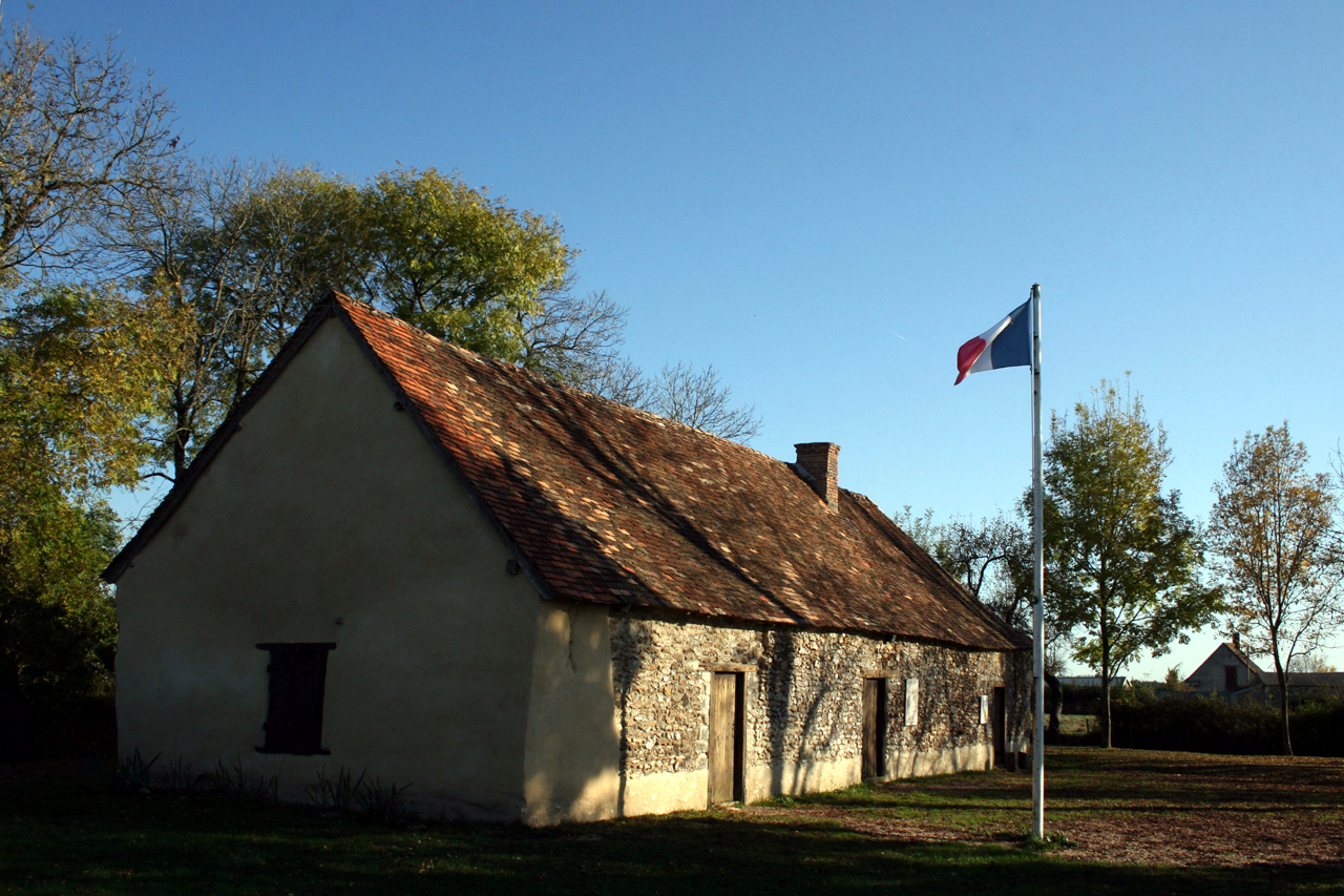 Musée acadien de la Ligne acadienne à Archigny